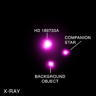 HD 189733b, la première Jupiter chaude détectée en transit devant sa planète par rayons X, avec légendes.